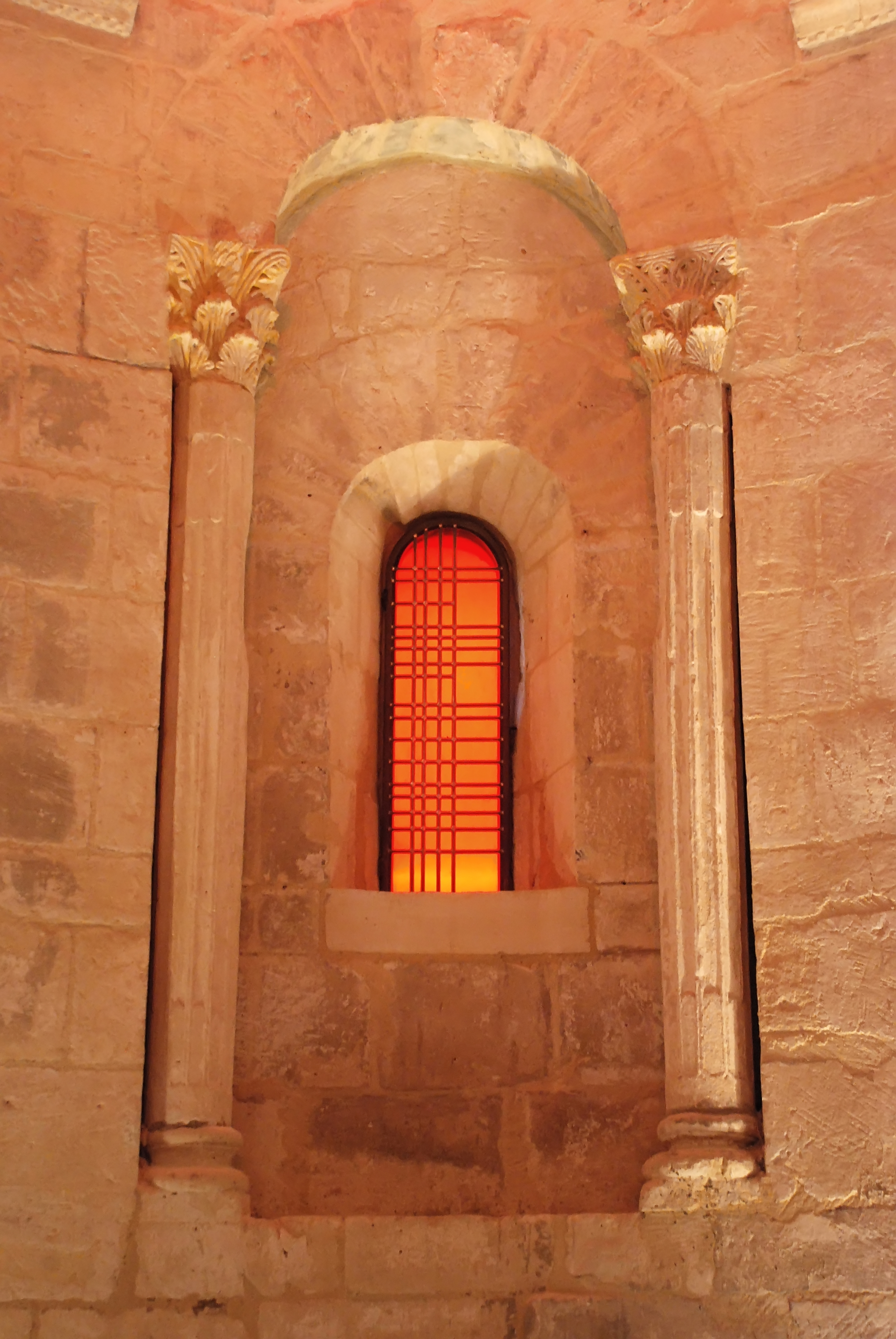 France - Provence - Prieuré Notre-Dame de Salagon